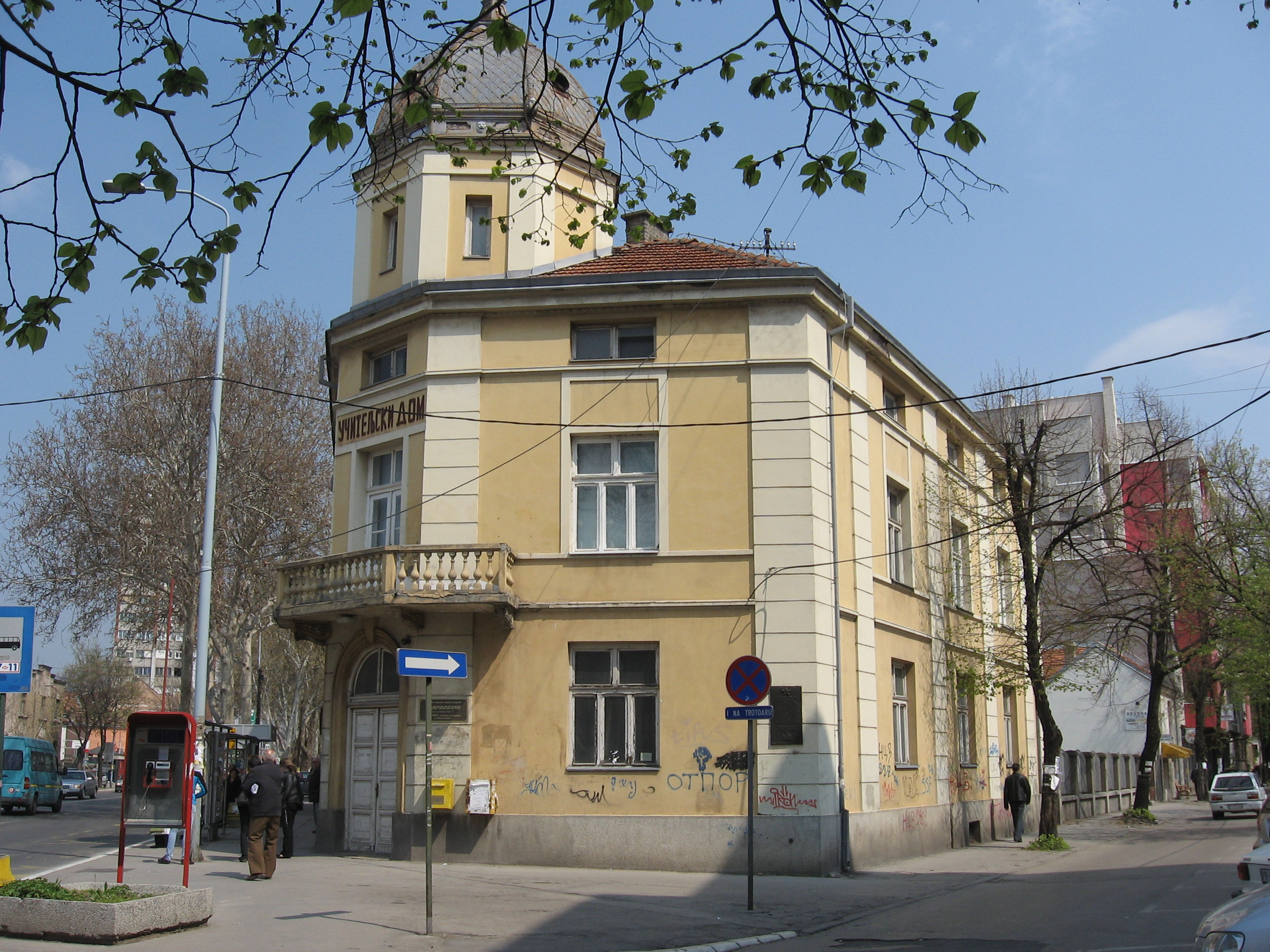 Uciteljski dom u Nišu.